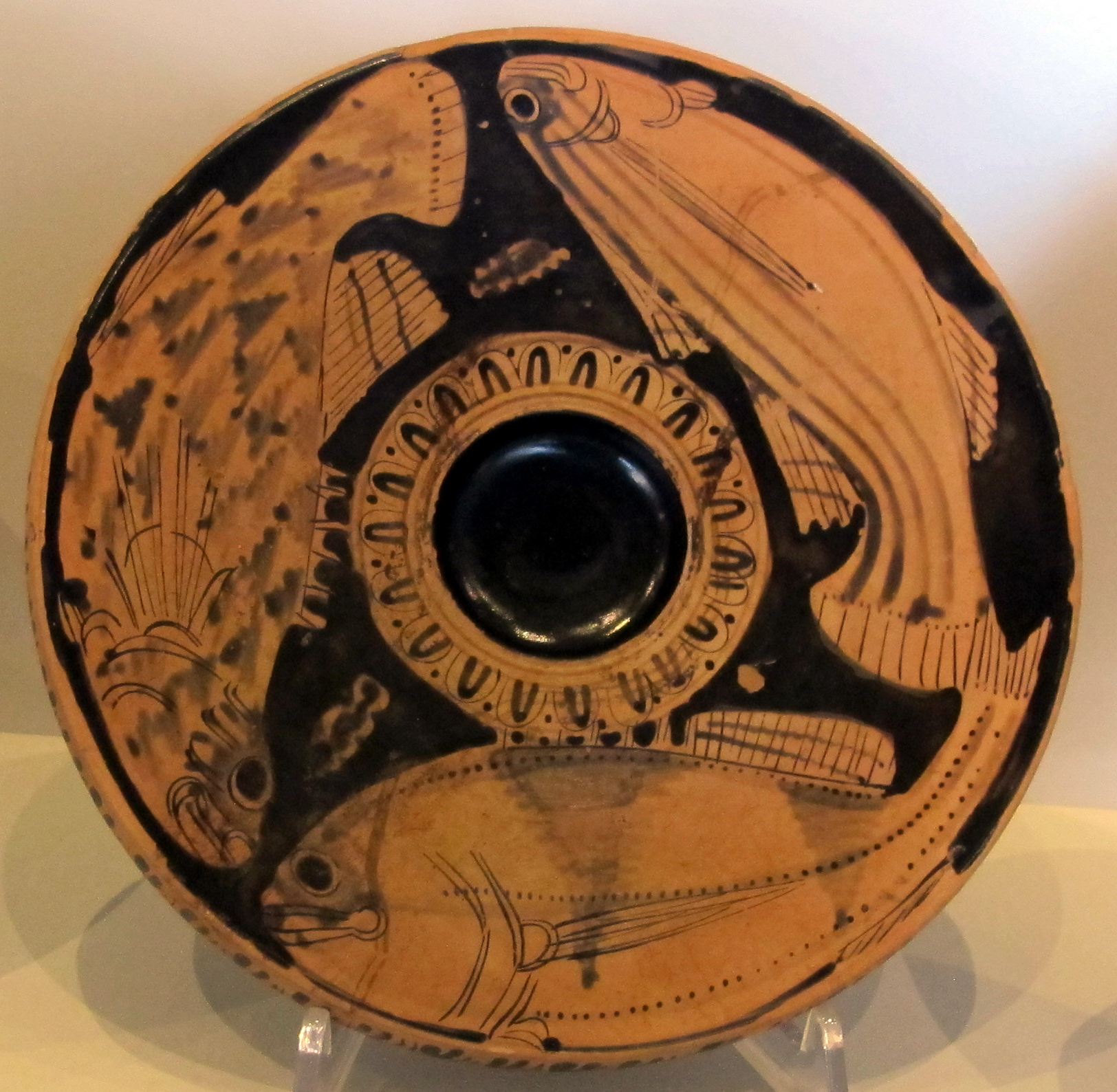 Museo Archeologico Nazionale - MIBAC This is a photo of a monument which is part of cultural heritage of Italy.